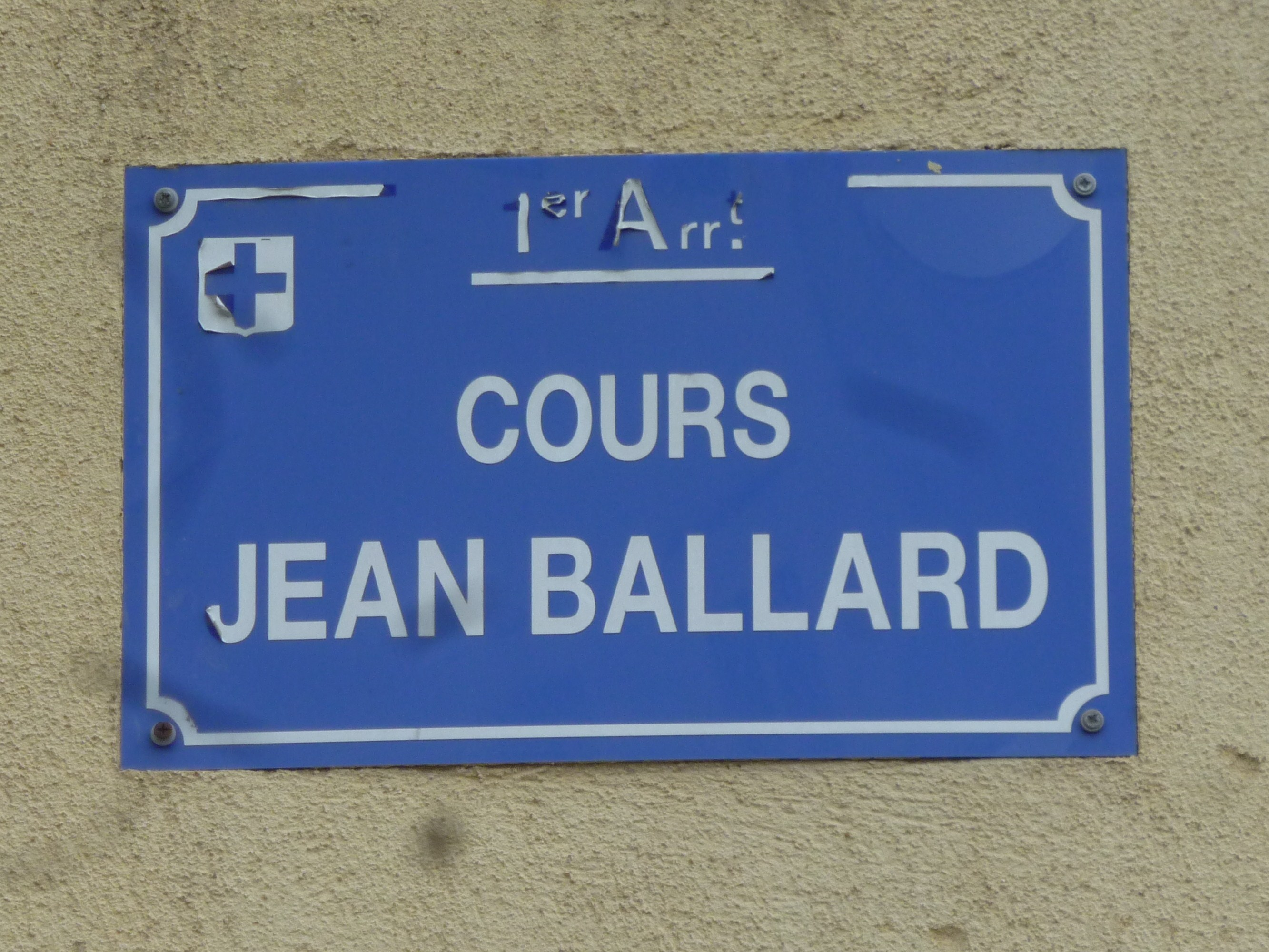 Plaque "Cours Jean Ballard" à Marseille (France) en hommage à l'éditeur